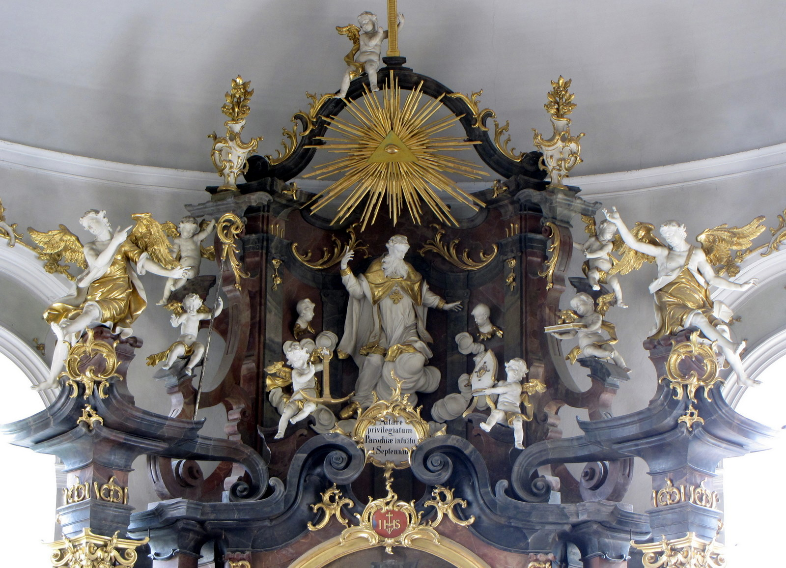 Joseph Stapf und Johann Sigmund Hitzelberger, Hochaltar der Pfarrkirche in Pfronten-Berg (Detail)